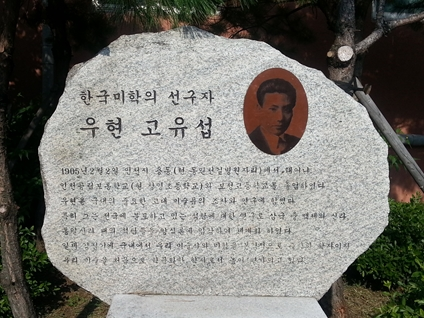 고유섭 푯돌 , 용동큰우물 옆쪽의 화단 한켠에 위치 . 우현 고유섭 소개